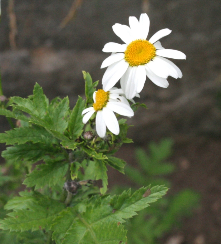 Tanacetum_corymbosum (Erba amara dei boschi) Località : Giardino Botanico Alpino "Giangio Lorenzoni", Pian Cansiglio, Tambre d'Alpago (BL), 1000 m s.l.m.